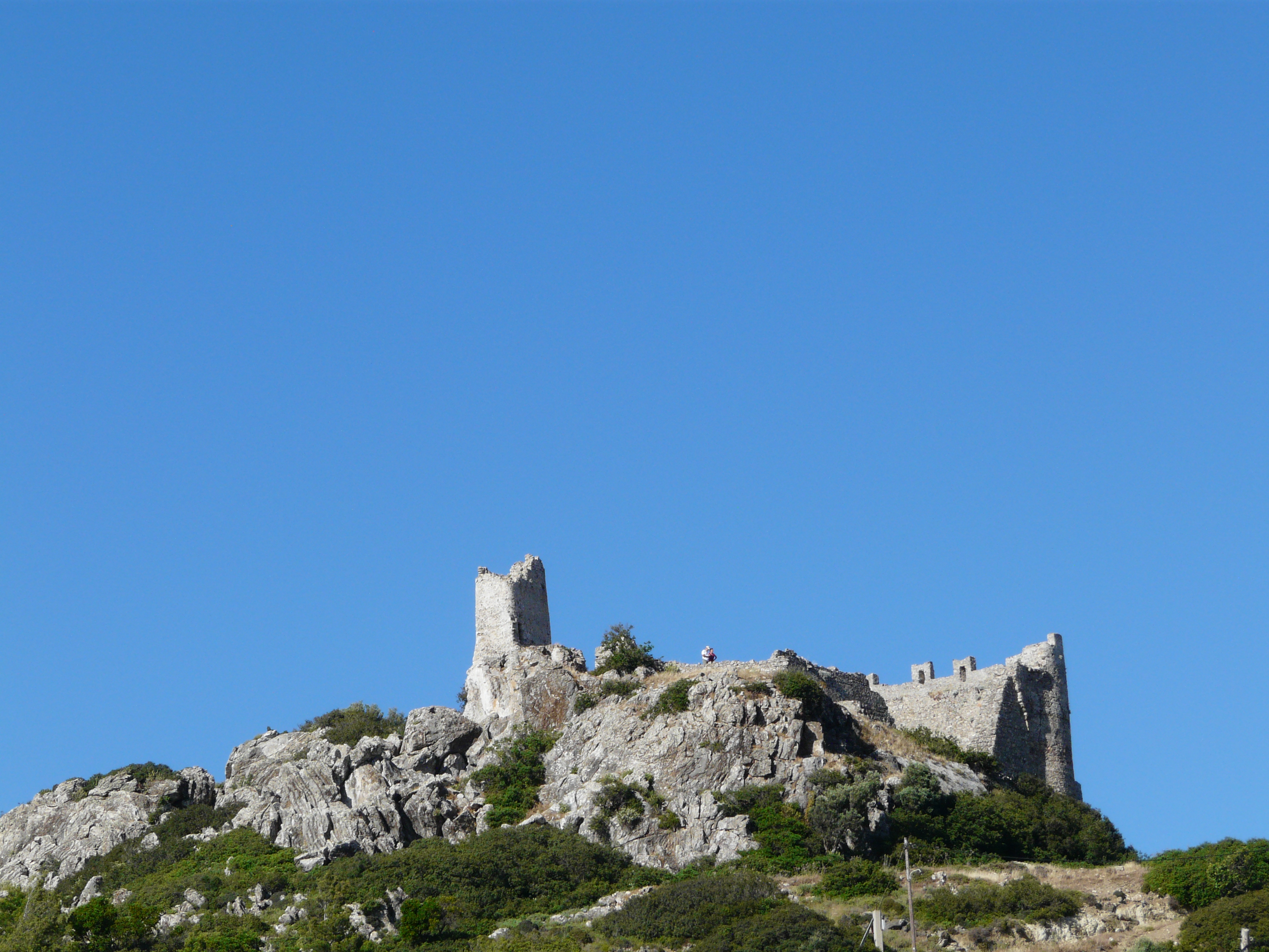 Asklipio (Rhodes). Castle in Asklipio